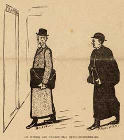 cartoon in het zondagsblad Het Volk